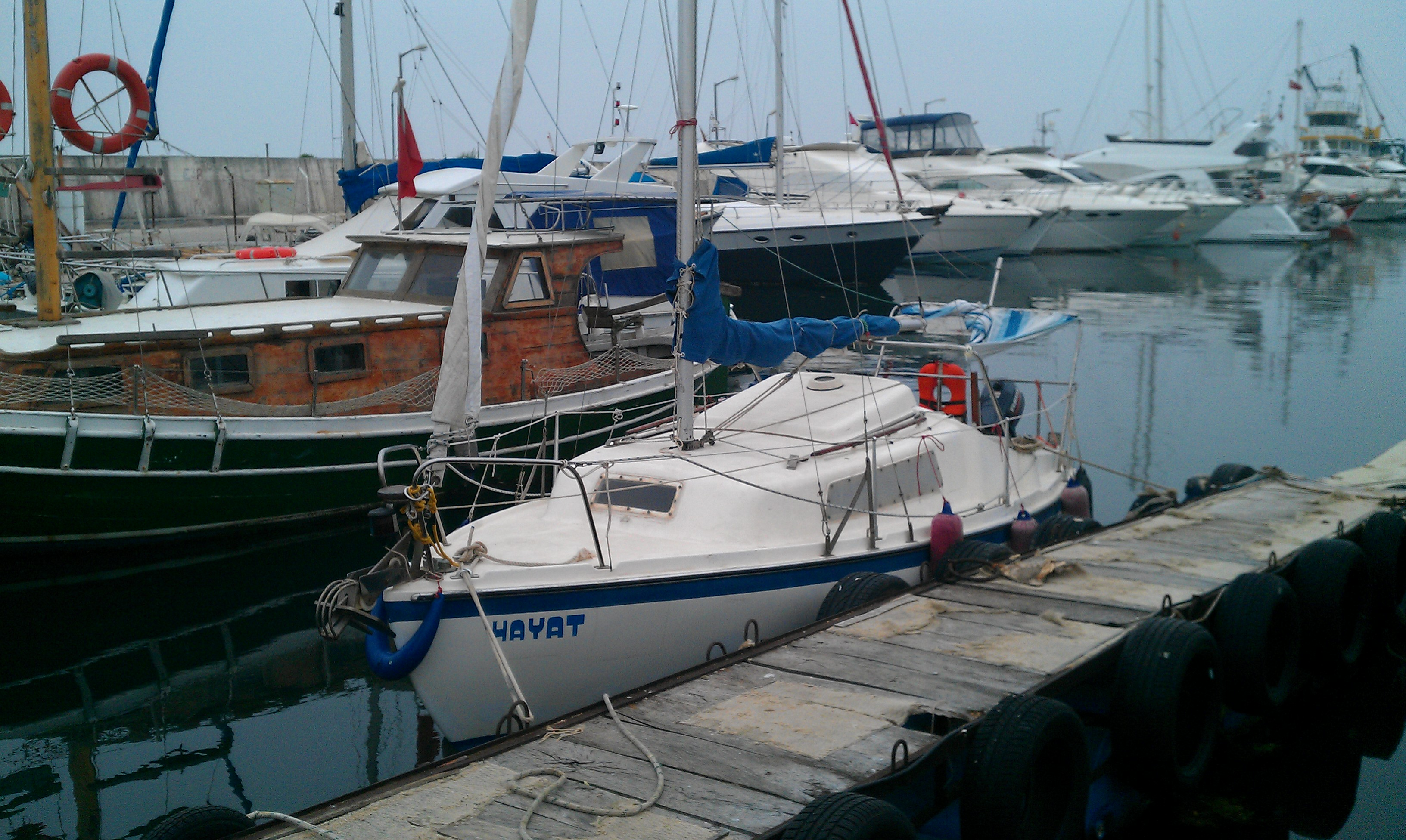 Kurşunlu Balıkçı Barınağı -03 Mayıs 2013